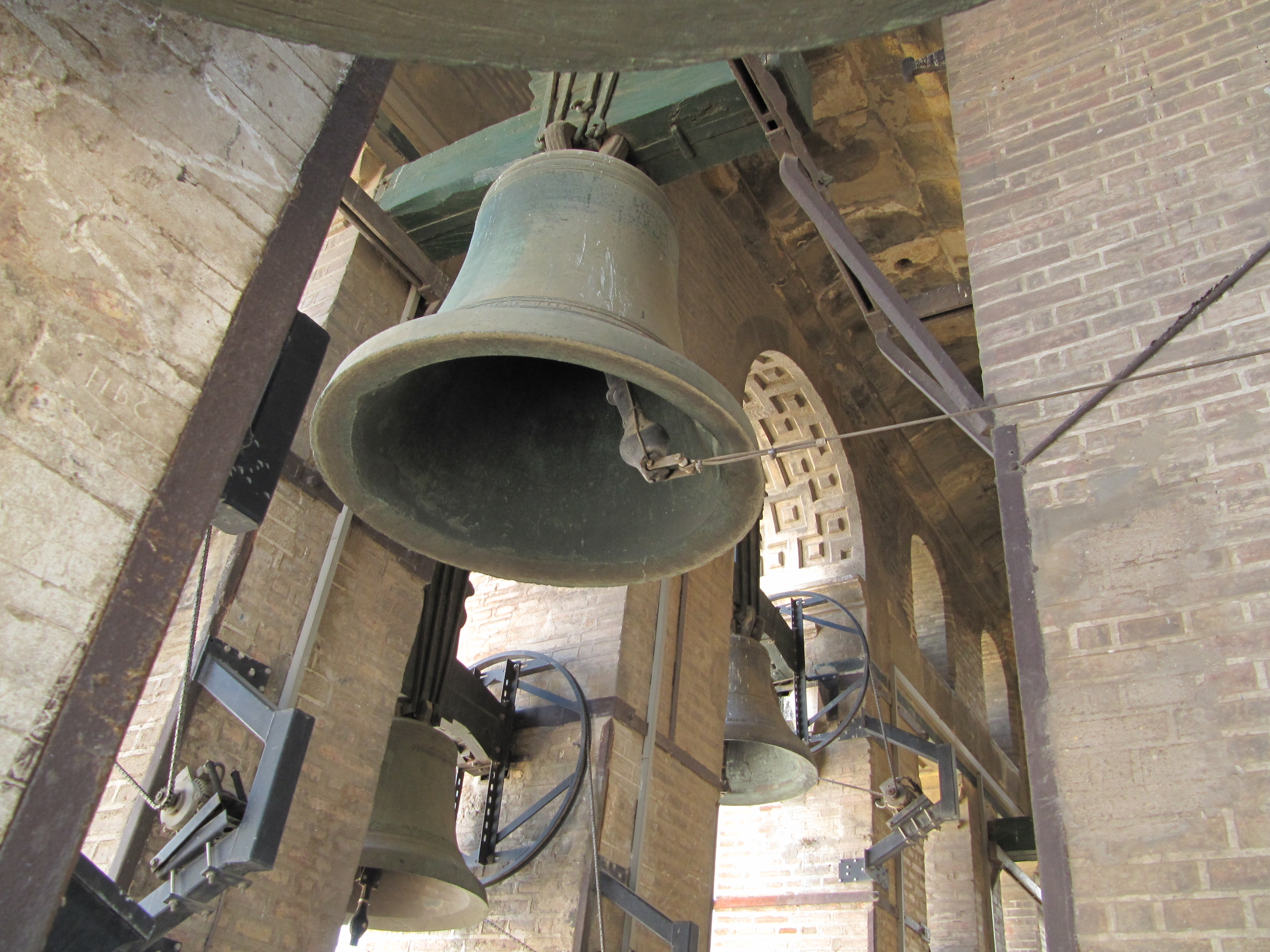 Sevilla - March 2011 - 067.jpg